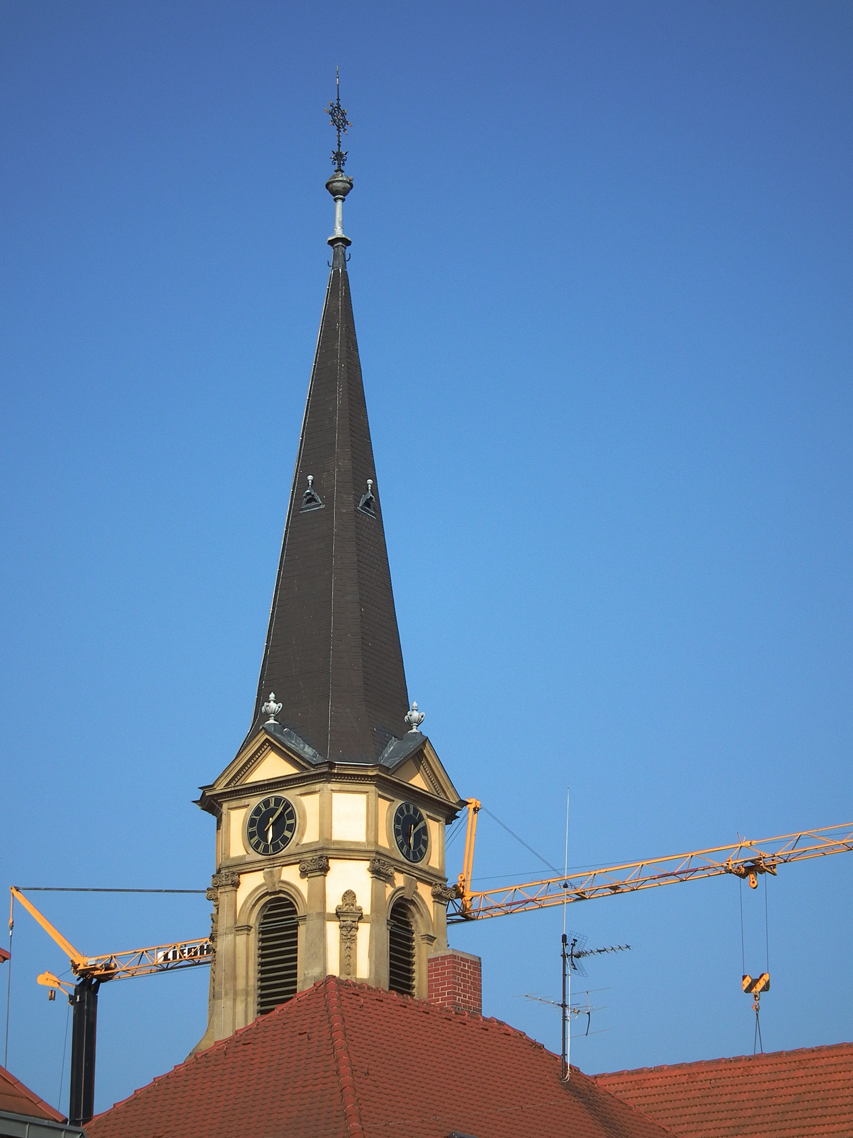 Turmspitze der evangelischen Kirche in Nußloch (Baden-Württemberg, Deutschland)